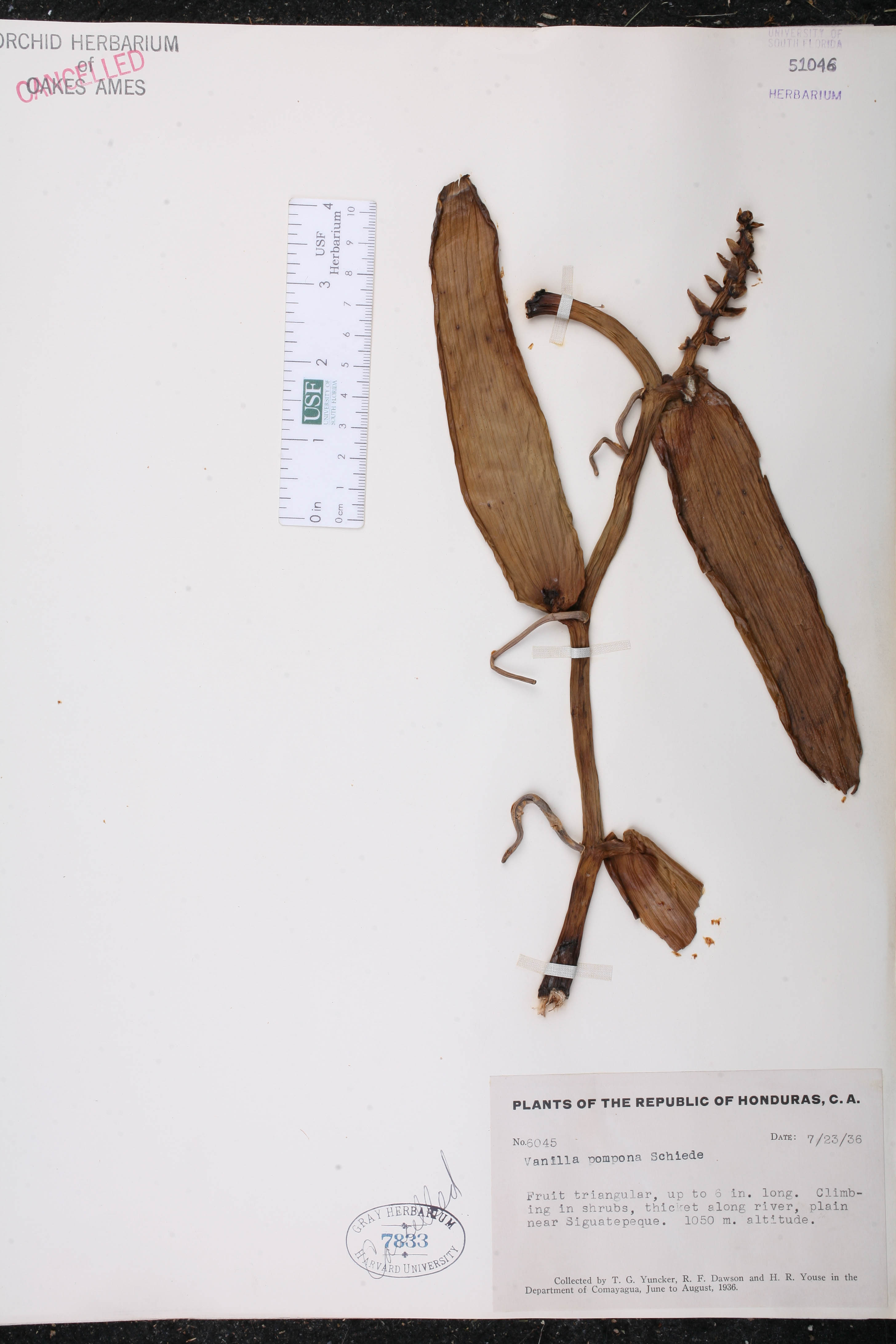 Vanilla pompona Schiede, planche d'herbier - spécimen collecté au Honduras en 1936 (herbier de l'université de Floride du Sud).